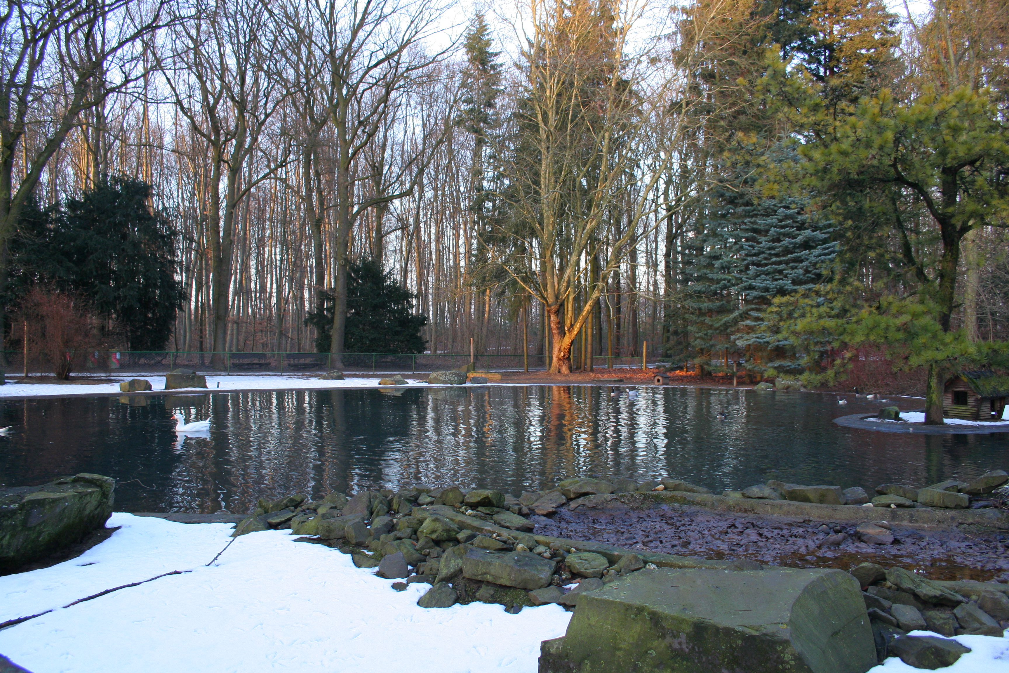 Wildpark Tannenbusch bei Dormagen. Wasserteich.